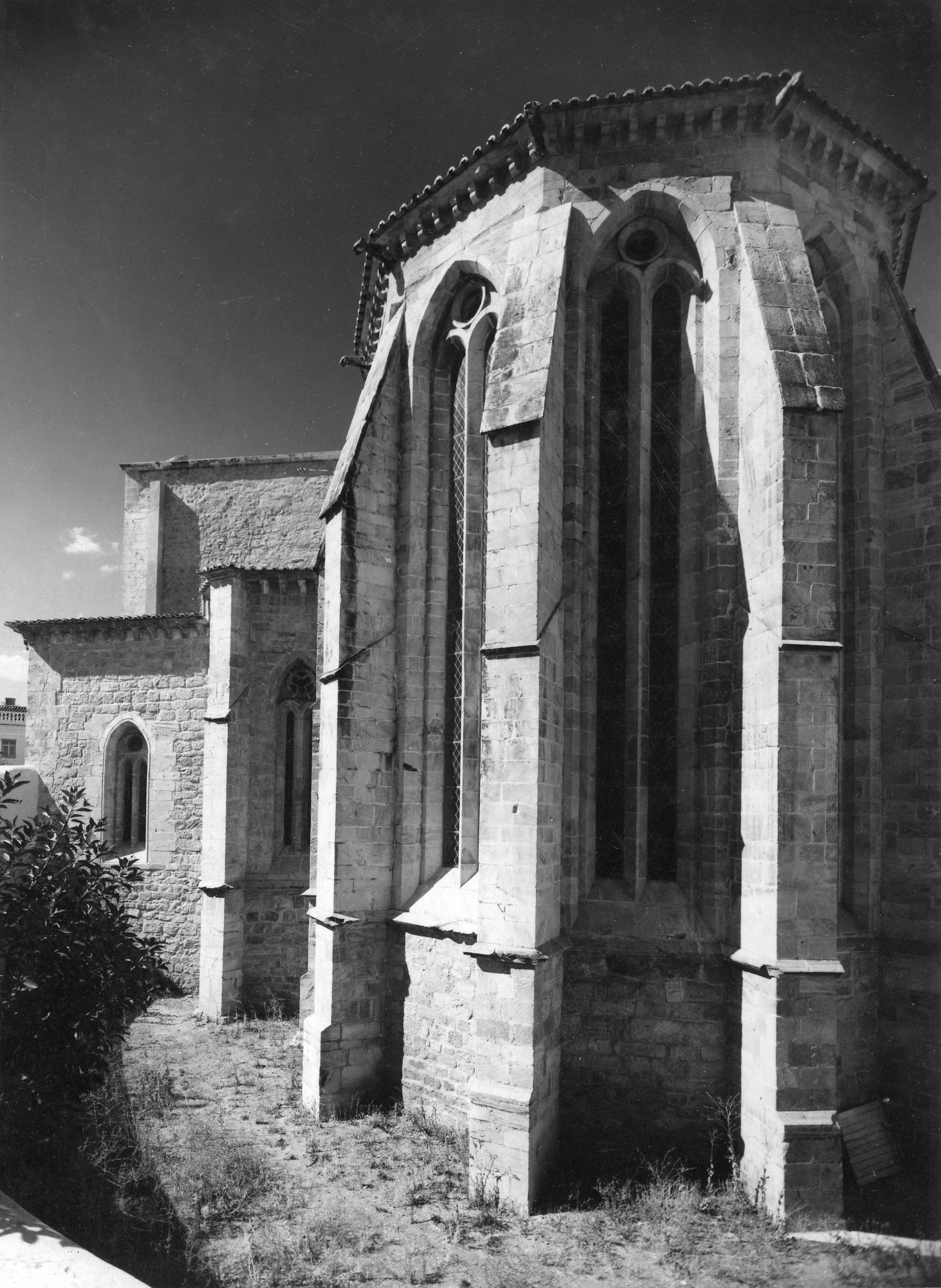 Apse of S. Domingos Church in Elvas, Portugal. Fotógrafo: Mário Novais, 1899-1967. Orientador científico: Mário Tavares Chicó, 1905-1966. Data aproximada da produção da fotografia original: 1954. [CFT015.241.ic]